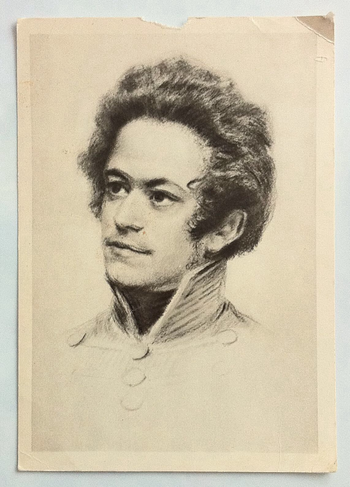 Un giovane Karl Marx